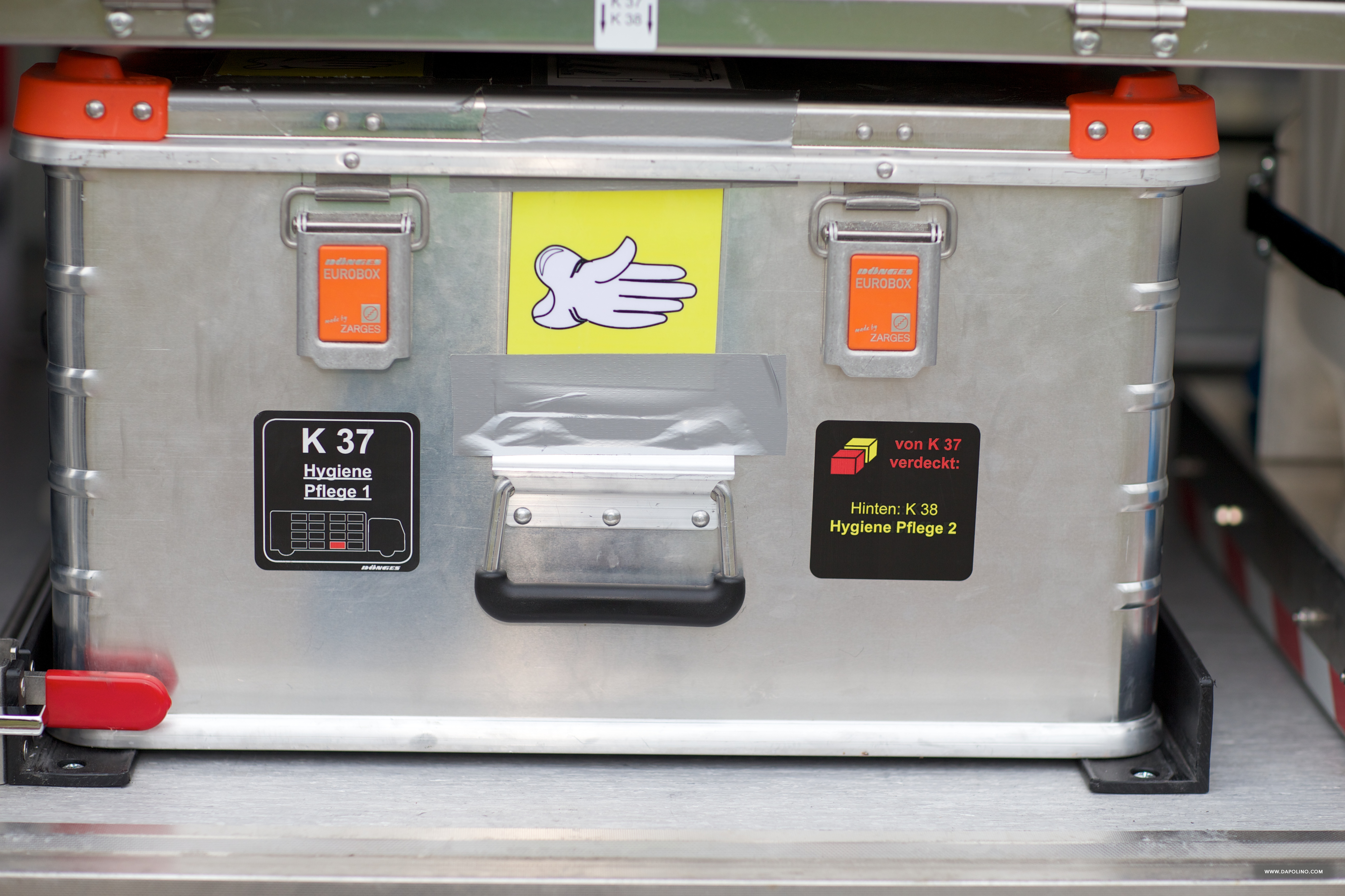 GW-SAN der MTF (Gerätewagen Sanitätsdienst der Medizinischen Task Force #1) Containersystem mit Bebauungsplan